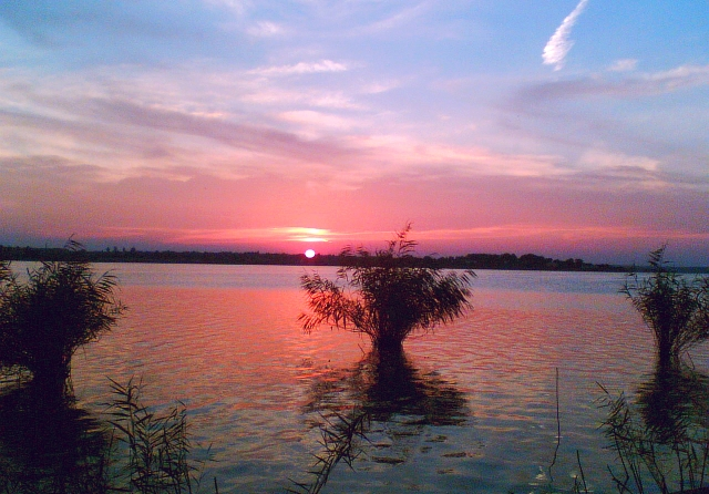 Apus pe Lacul Siutghiol